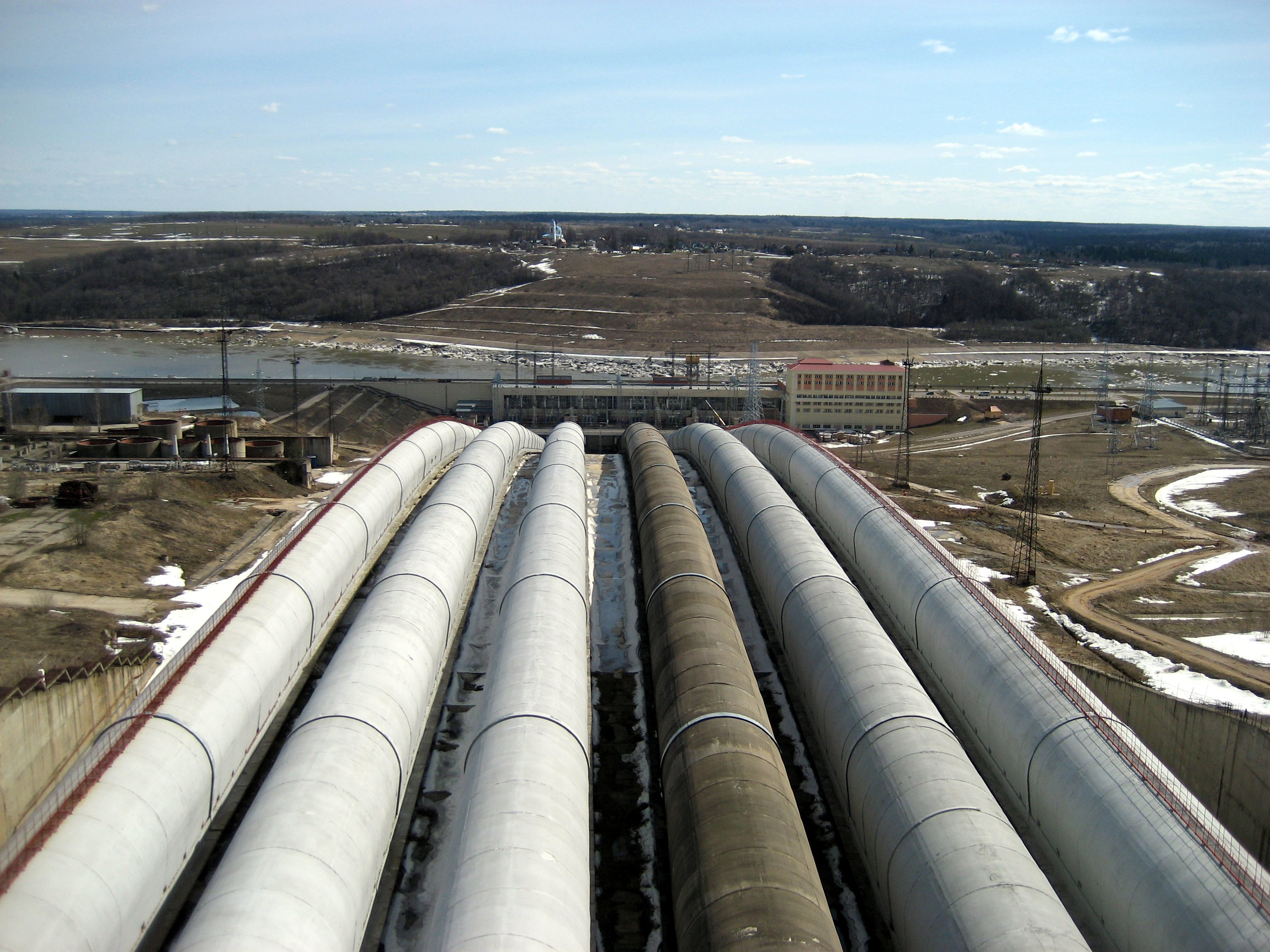 водоводы Загорской ГАЭС